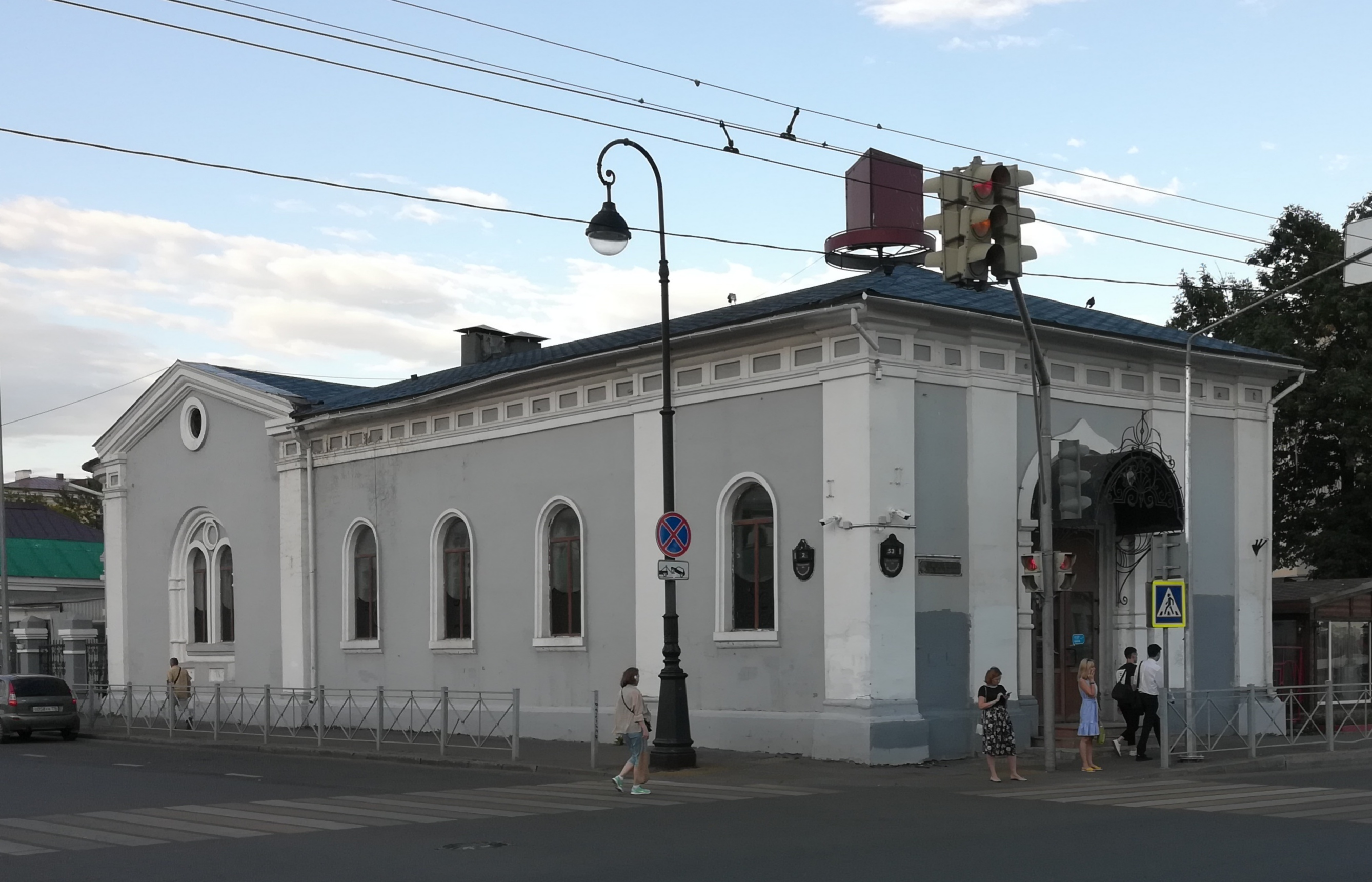 Университетская улица. Казань